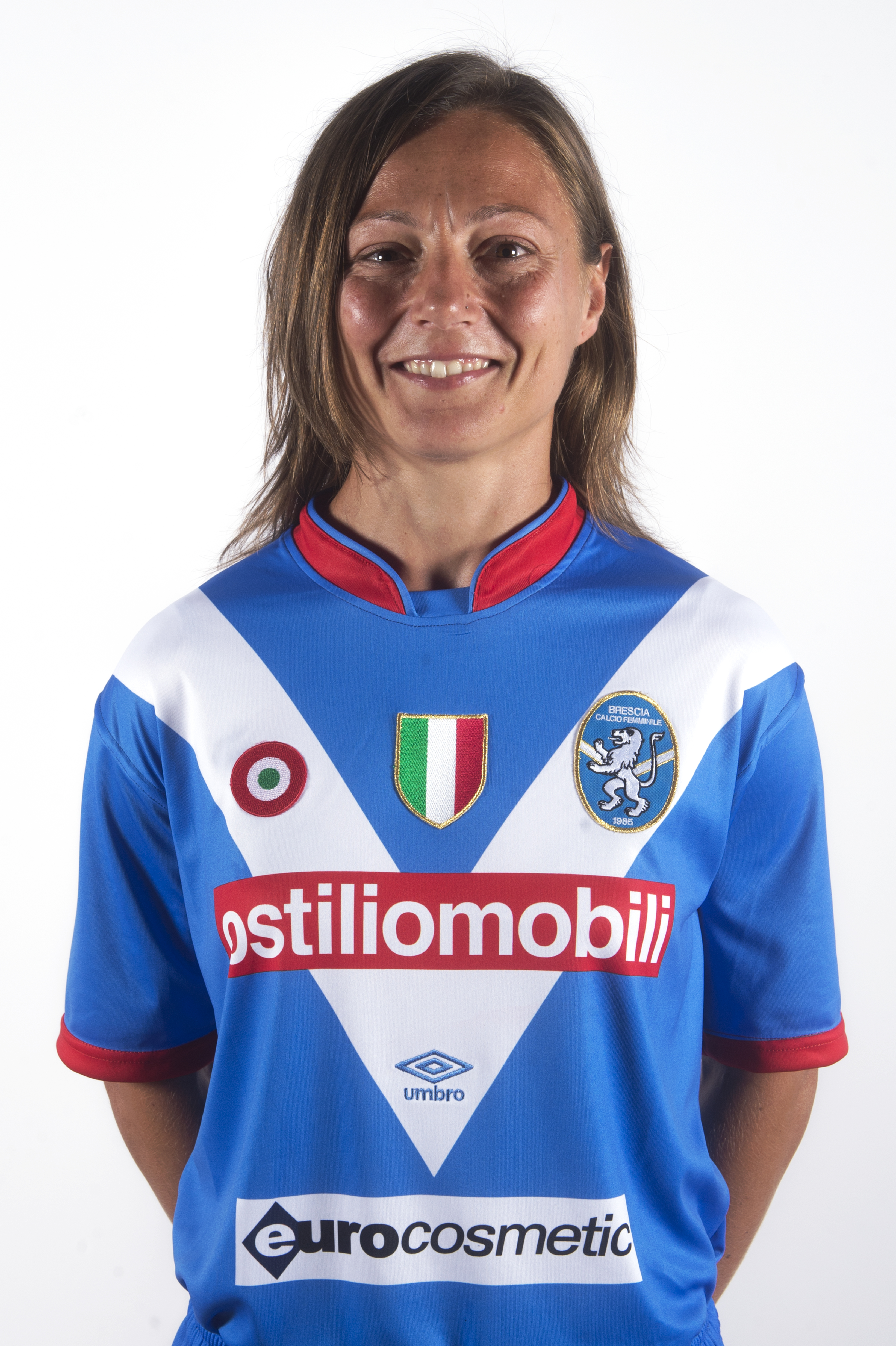 Silvia Fuselli, centrocampista, foto ufficiale Brescia Calcio Femminile stagione 2016-2017.